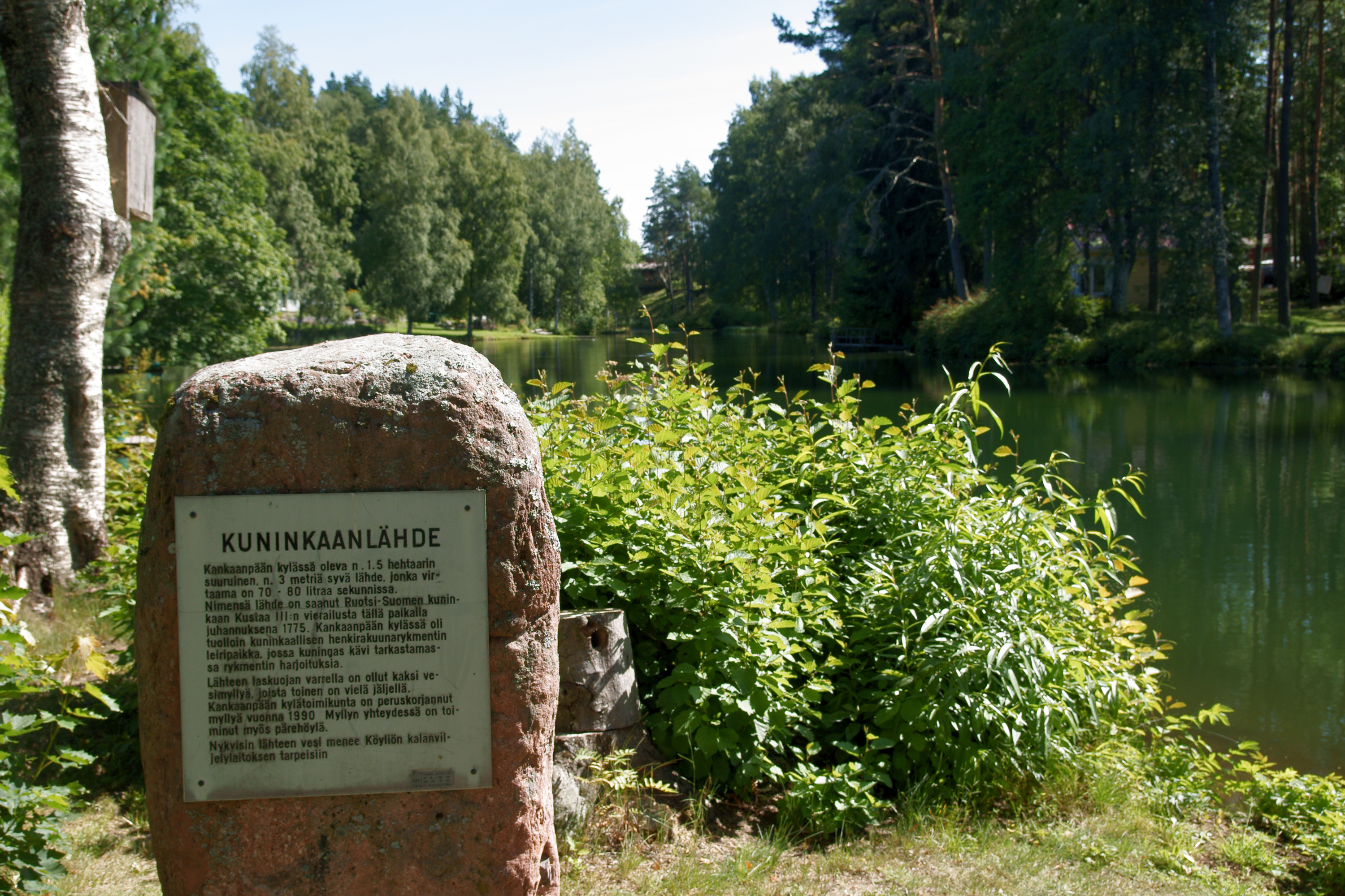 Kuninkaanlähde Köyliön Kankaanpäässä.